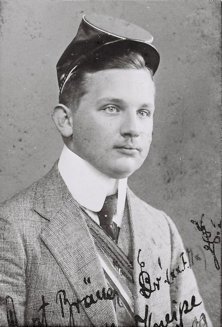 Porträtfotografie von Curt Bräuer.